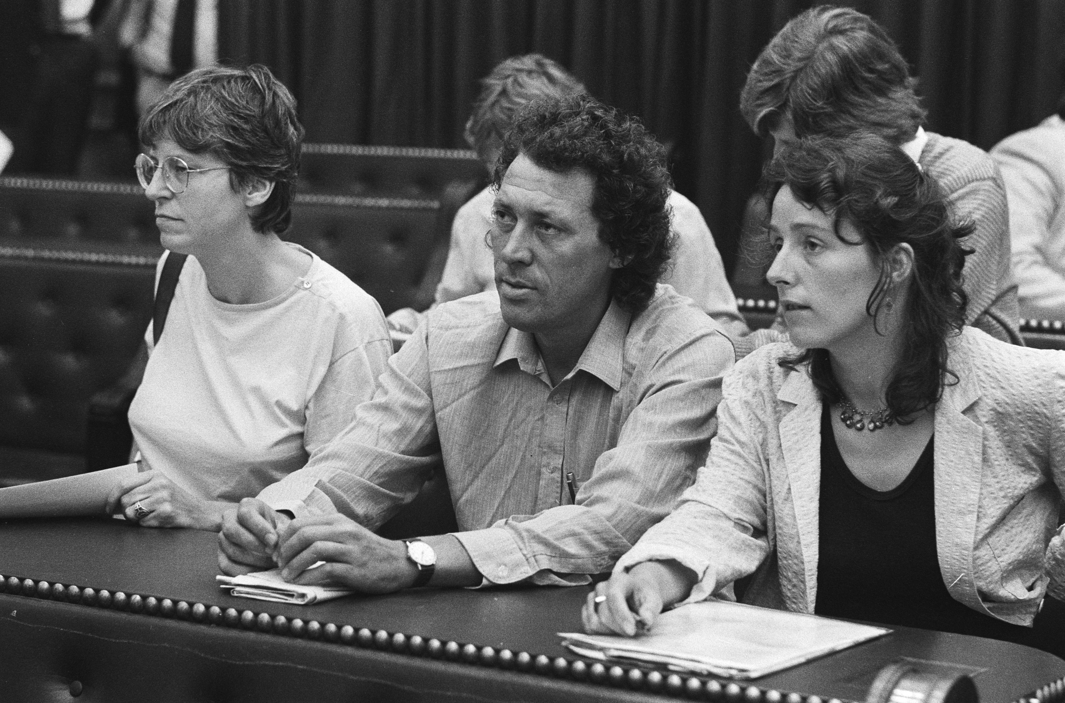 Collectie / Archief : Fotocollectie Anefo Reportage / Serie : Tweede Kamer Beschrijving : CPN-fractie; v.l.n.r. mw. Evelien Eshuis, dhr. Gijs Schreuders en mw. Ina Brouwer Datum : 1 september 1983 Locatie : Den Haag, Zuid-Holland Trefwoorden : parlementariërs, vergaderingen Persoonsnaam : Brouwer, Ina, Eshuis, Eveline, Schreuders, Gijs Fotograaf : [onbekend] Auteursrechthebbende : Nationaal Archief Materiaalsoort : Negatief (zwart/wit) Nummer archiefinventaris : bekijk toegang 2.24.01.05 Bestanddeelnummer : 932-6847